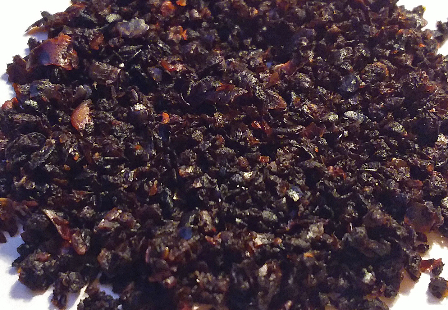 Flocken des türkischen "Urfa biber", auch "Isot-Chili" genannt.